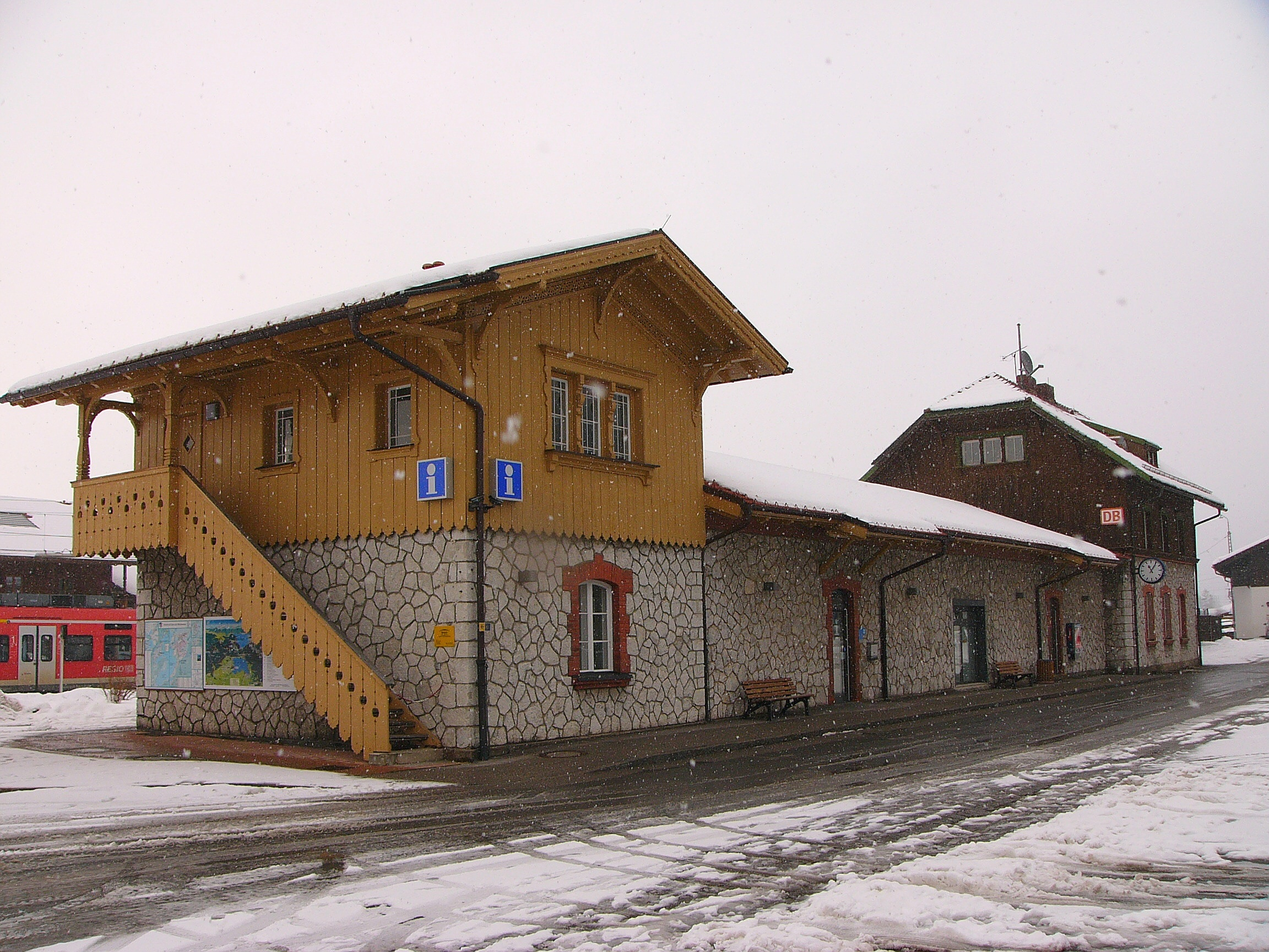 Bahnhof, einheitlich gestaltete Baugruppe, 1898; Stationsgebäude, Schopfwalmdachbau mit verbrettertem Obergeschoss über bruchsteinverkleidetem Erdgeschoss, quergerichtetem Flachsatteldach-Nebengebäude mit hölzerner Außentreppe und dazwischen eingespannter erdgeschossiger Schalter- und Wartehalle mit offener Flachsatteldachkonstruktion; ehem. Waschküche und Holzlege, erdgeschossiger Satteldachbau mit bruchsteinverkleideten übergiebelten Mittelrisaliten; Güterschuppen, erdgeschossiger Putzbau mit Flachsatteldach und Segmentbogenfenstern.This is a photograph of an architectural monument.